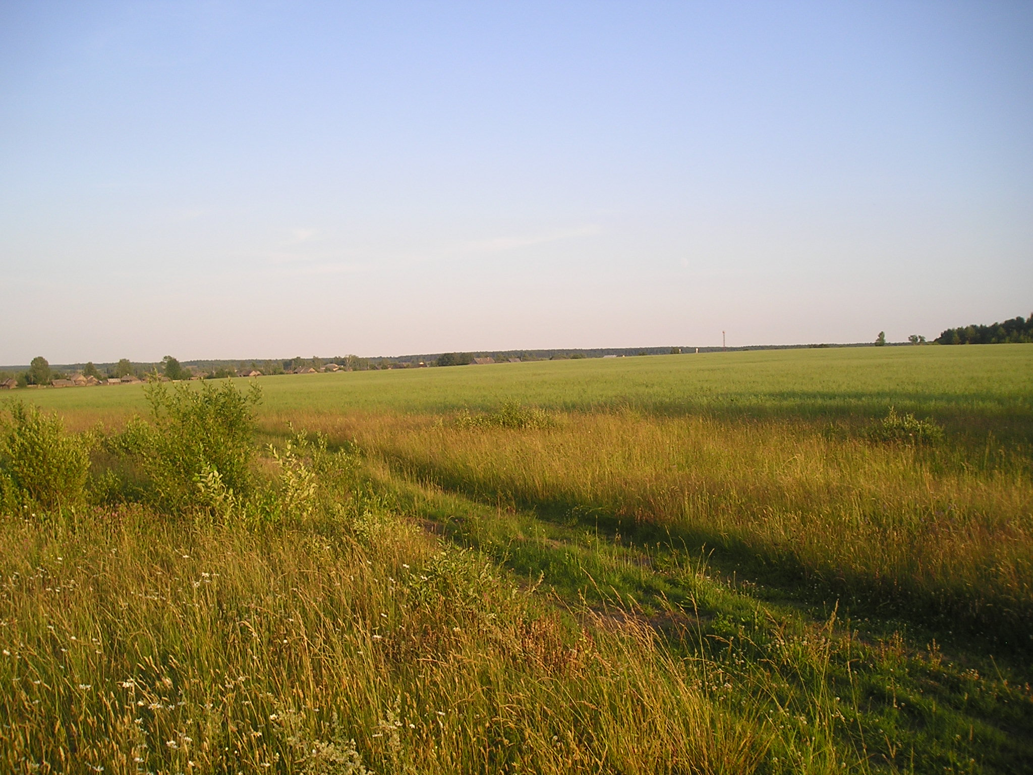 Юрово. В поле вечером